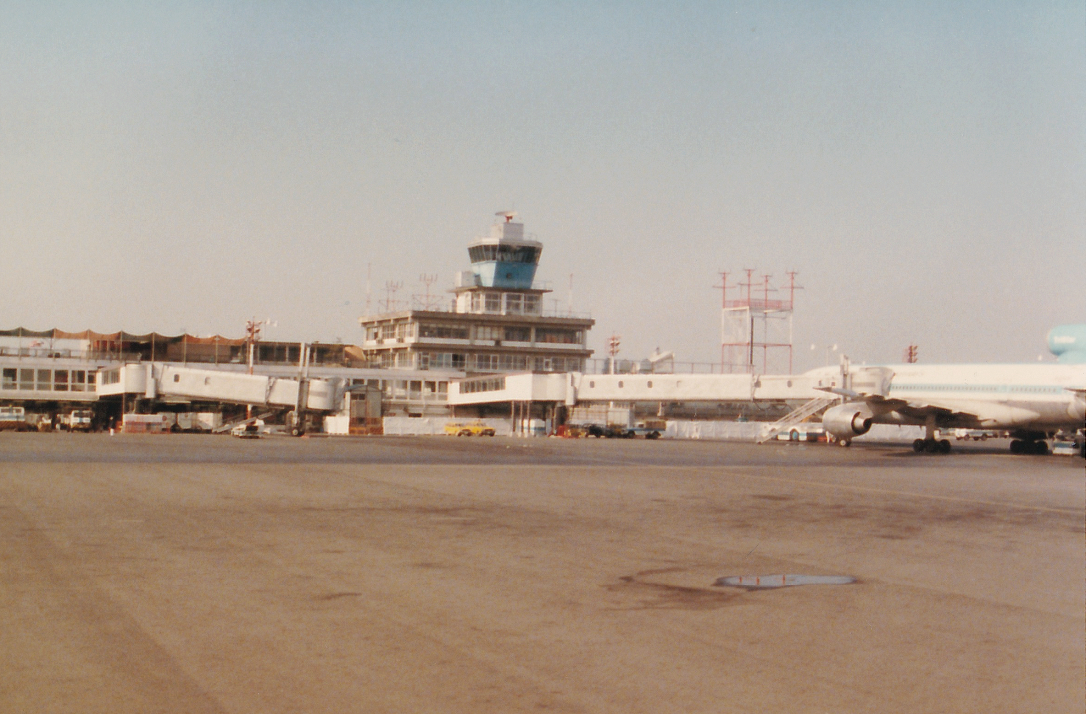 名古屋空港の管制塔とロッキード L-1011 トライスター（1979年）